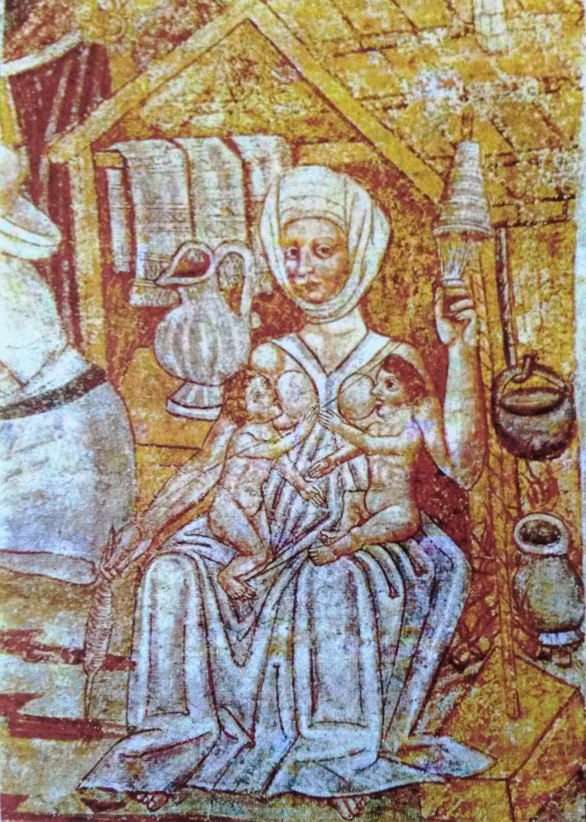 Ева за кормлением и прядением. Деталь фрески в Свято-Троицкой церкви в Храстовле